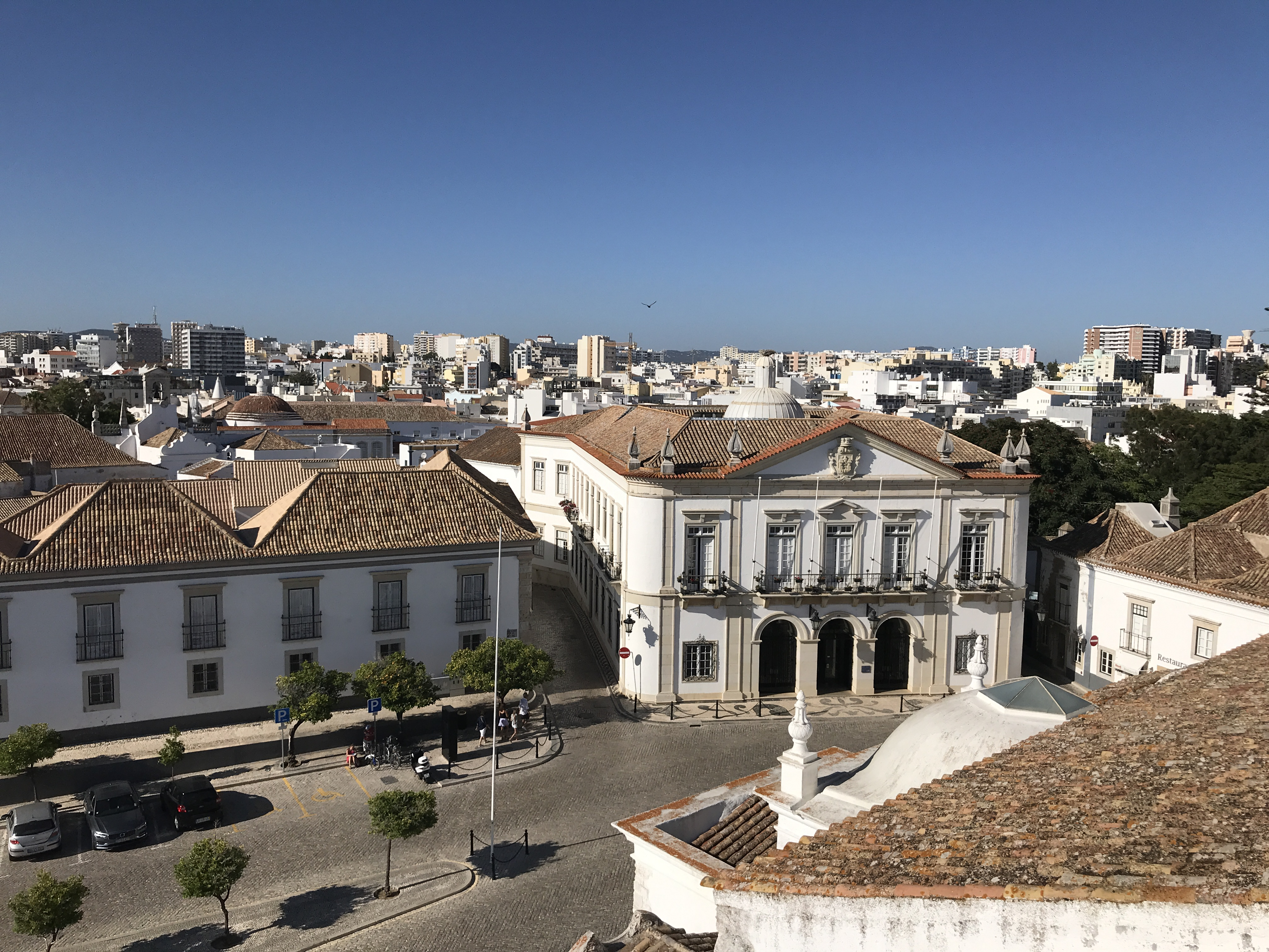 Faro. Vista de la plaza de la catedral desde el campanario.